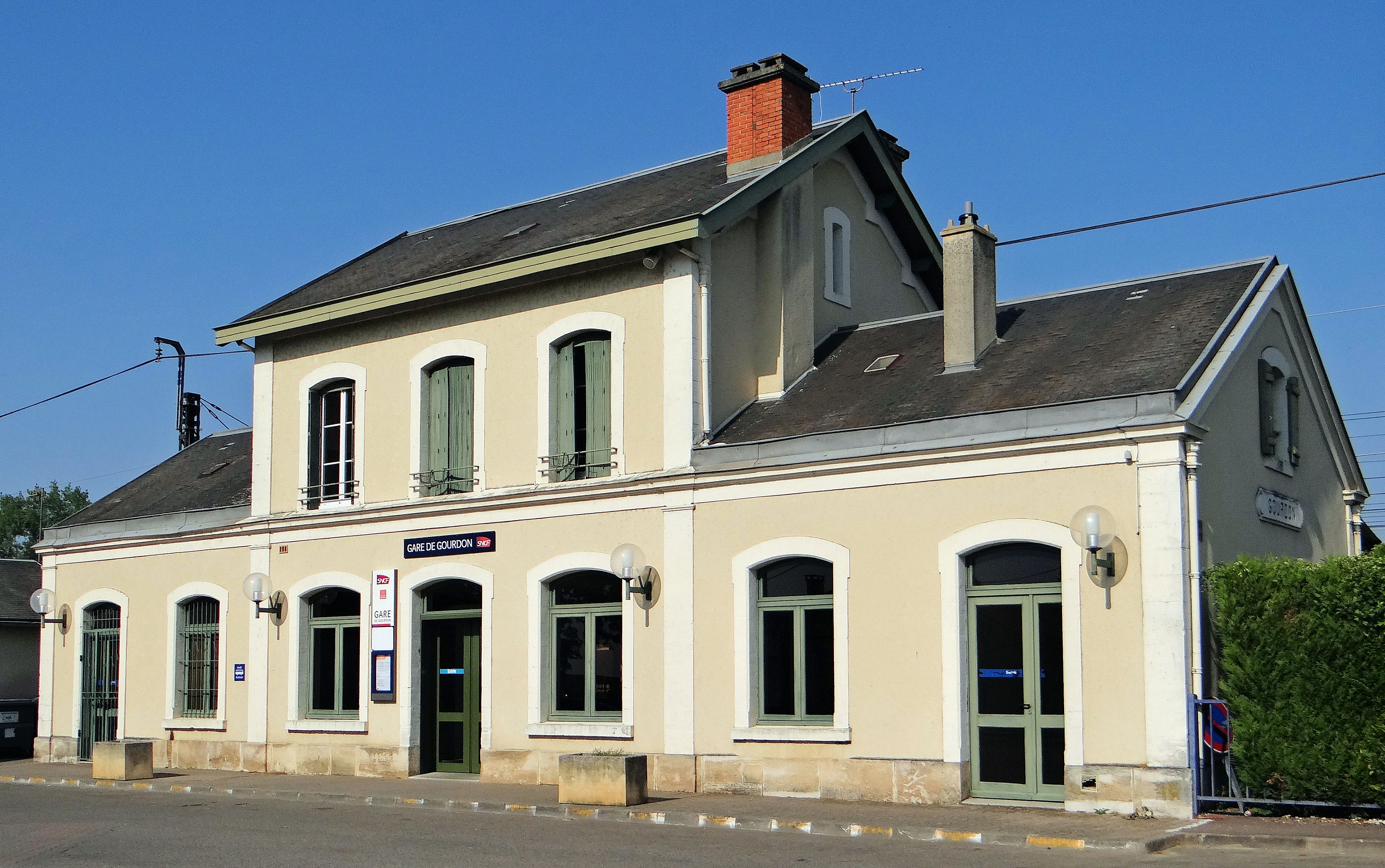 Gare de Gourdon, côté ville